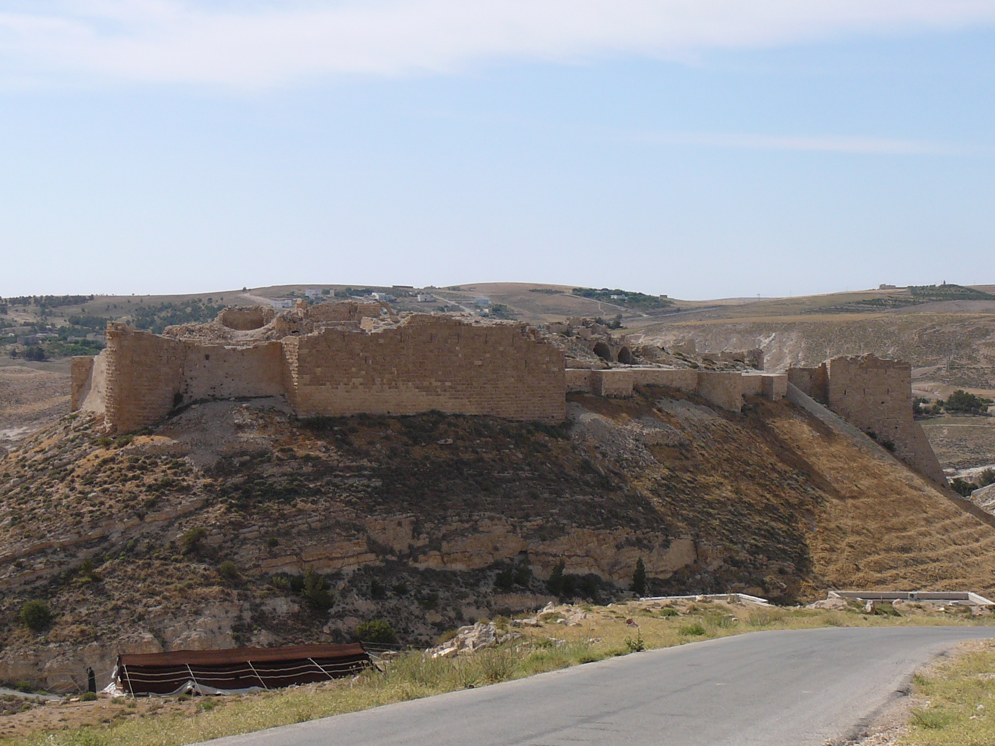 Shobak Castle Jordan 2007